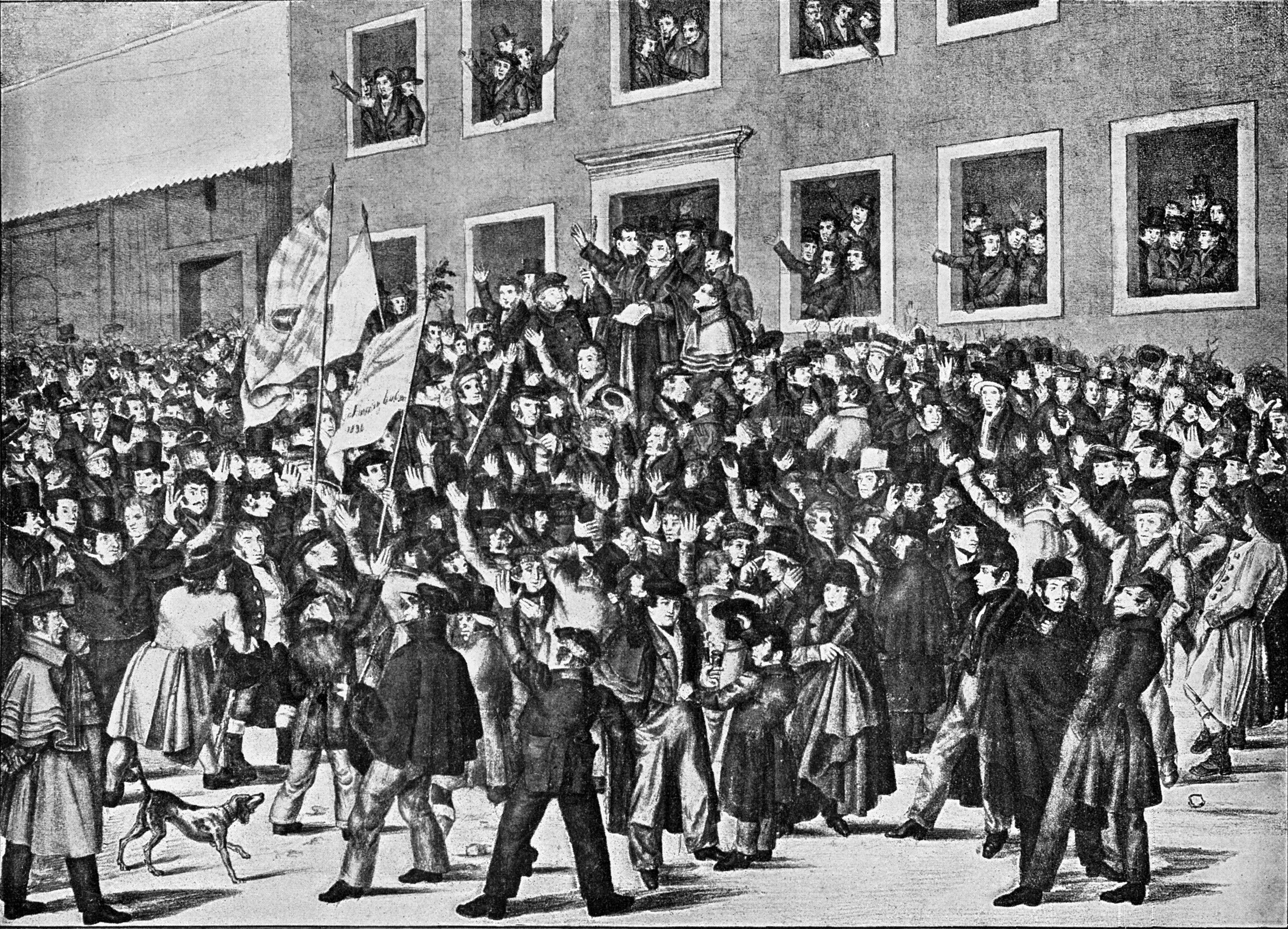 Die Volksversammlung in Balsthal am 22. Dezember 1830 im Gasthof Rössli: Redner Josef Munzinger. Nach einer Zeichnung von J. Senn, lithographiert von Schmid in Basel. Bürgerbibliothek Luzern.